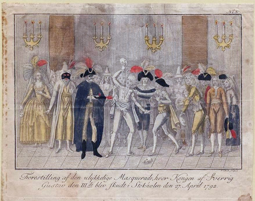 Skottet på maskeradbalen skildrat på en samtida dansk gravyr av Frichit.